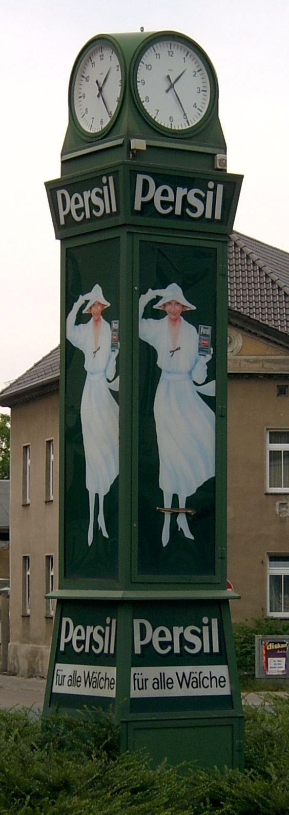 Die "Persiluhr" in Köthen (Anhalt).